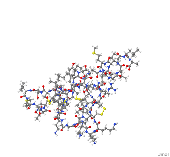 OMEGA-AGATOXIN-IVA